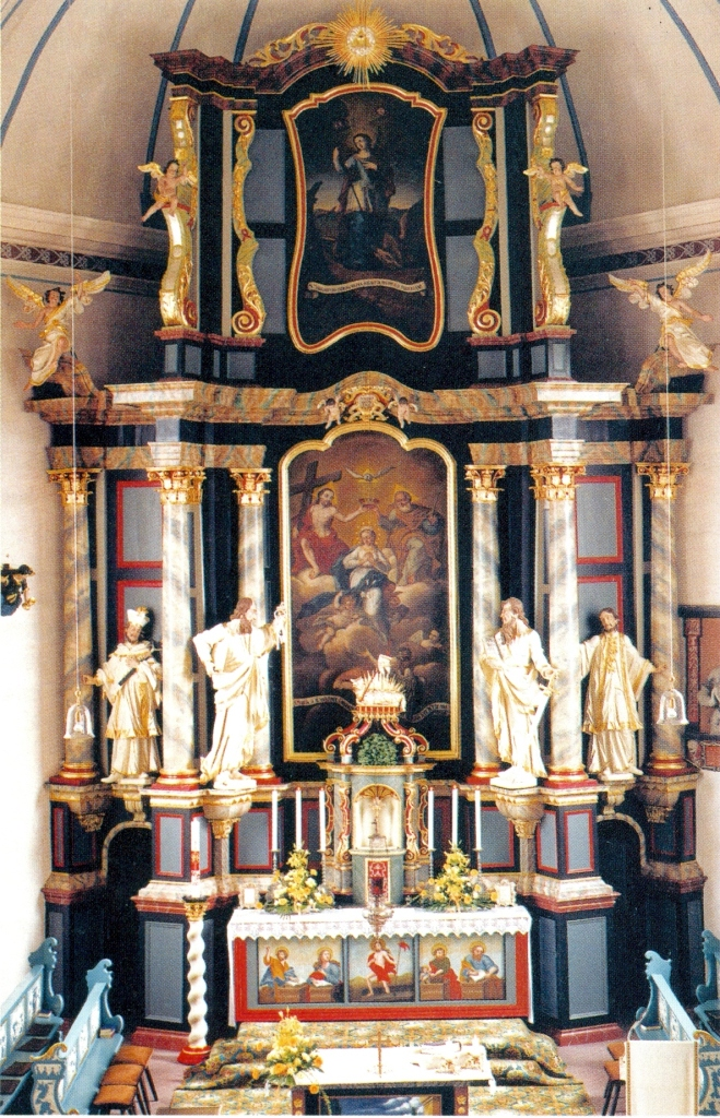 Hochaltar Pfarrkirche St. Margaretha Hasselbach im Taunus